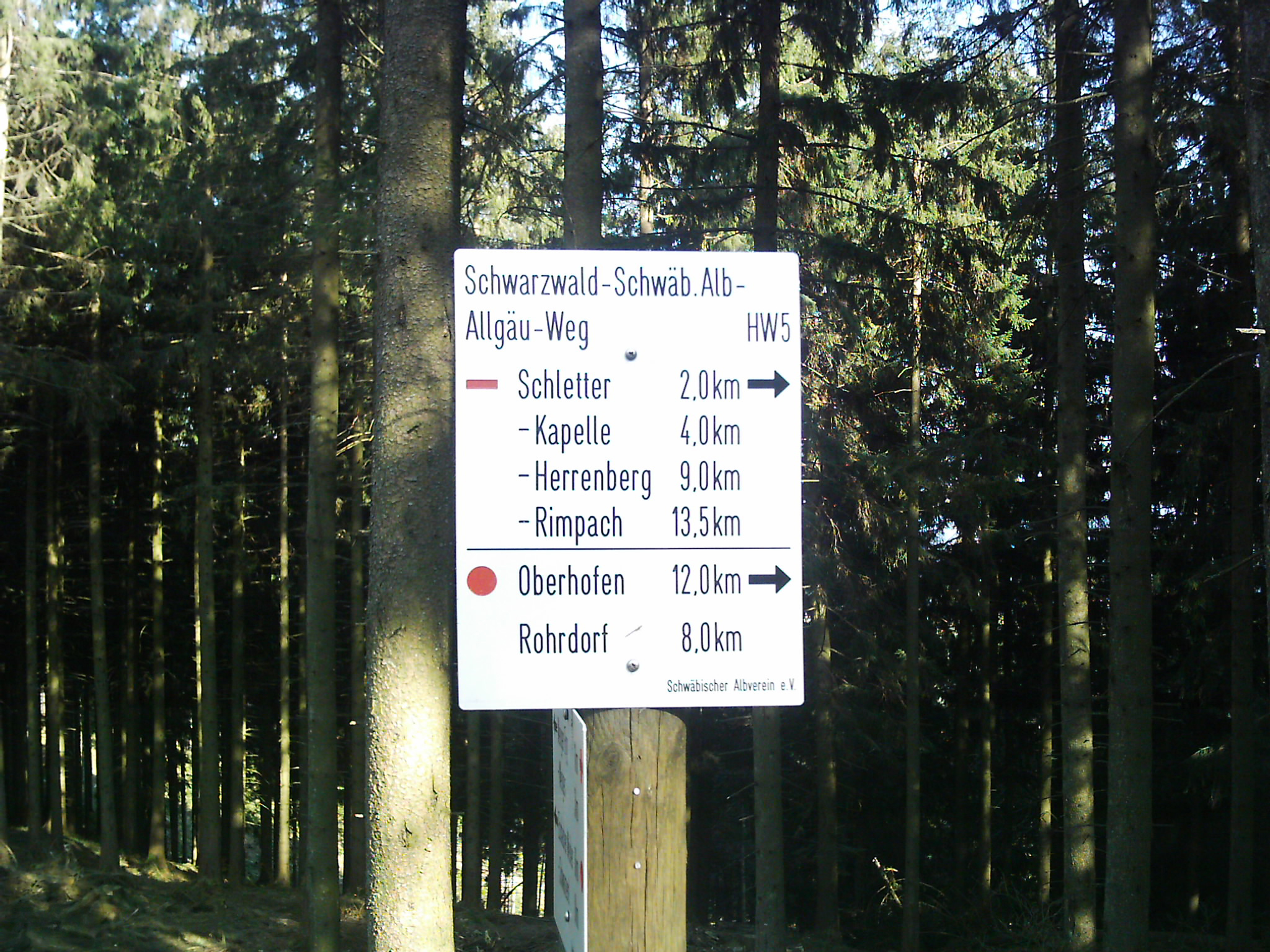 Wanderwege am Schwarzen Grat, Isny im Allgäu, Baden-Württemberg